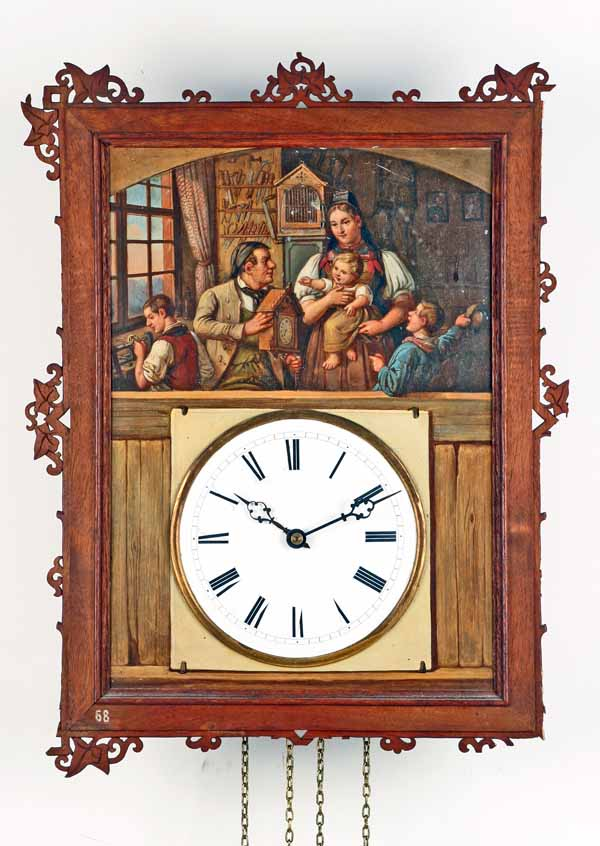 Bemalt wohl von Johann Laule, Uhrwerk Uhrmacherschule, Furtwangen, um 1860 (Deutsches Uhrenmuseum, Inv. 07-0068)